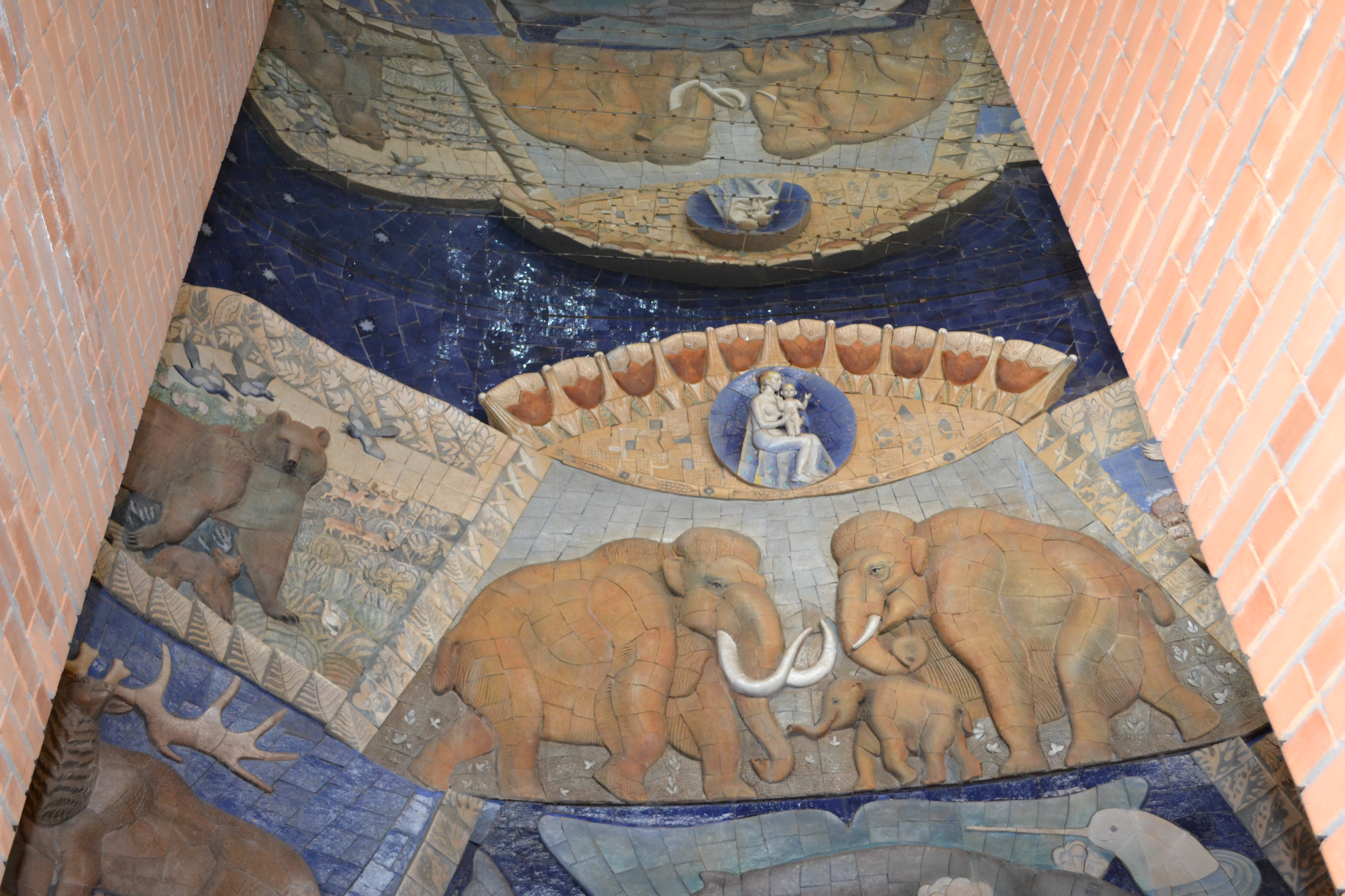 Панно в Палеонтологическом музее